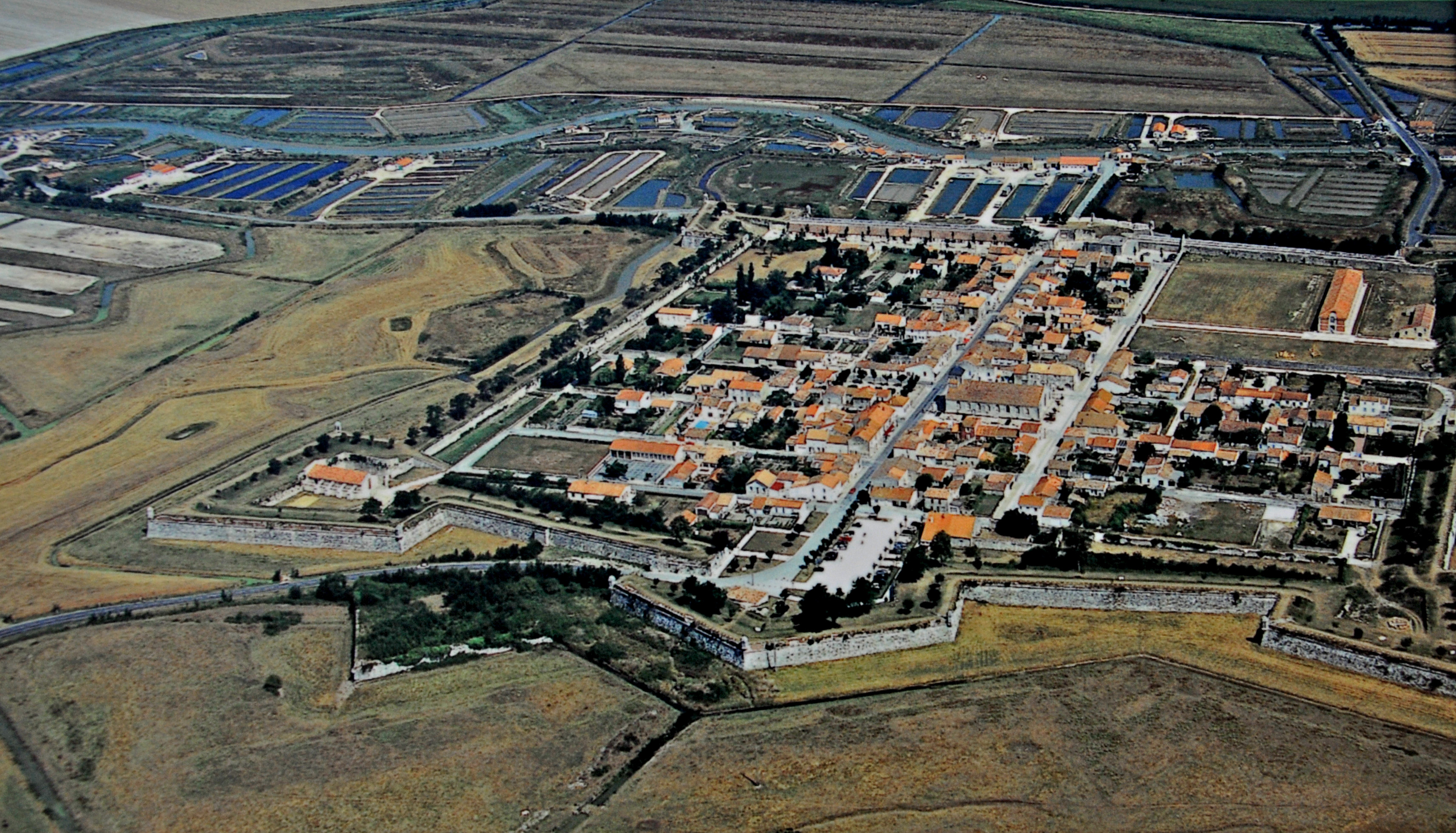 Brouage, die Zitadelle aus der Luft, öffentlich aufgestelltes Ortsschild